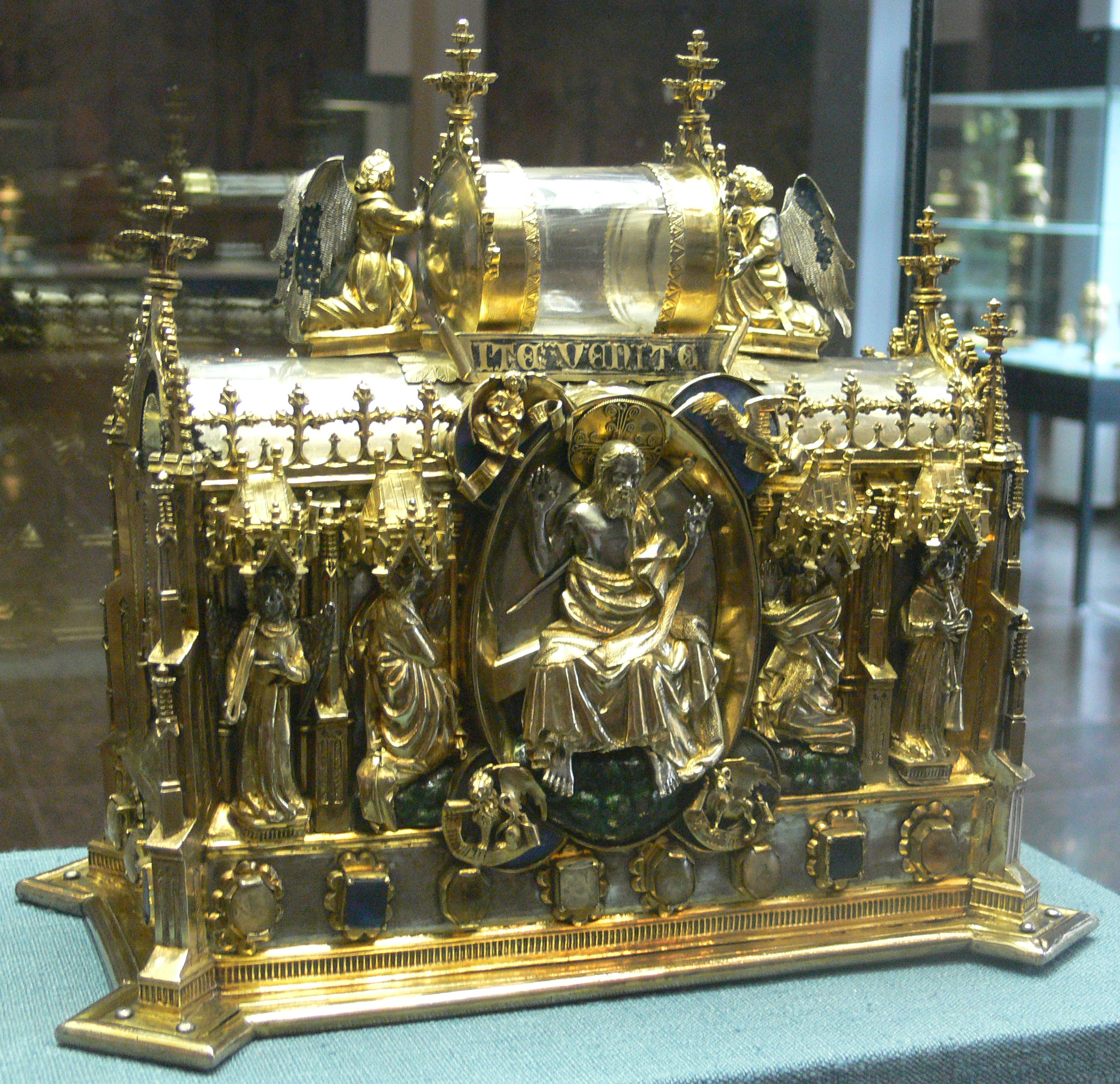 Lüneburger Ratssilber, ehemals im Lüneburger Rathaus, heute im Kunstgewerbemuseum Berlin Reliquar („Bürgereidkristall“), Silber, teilweise vergoldet und emailliert, Halbedelsteine; Hans von Lafferde, Lüneburg 1443, Inv. 74,371